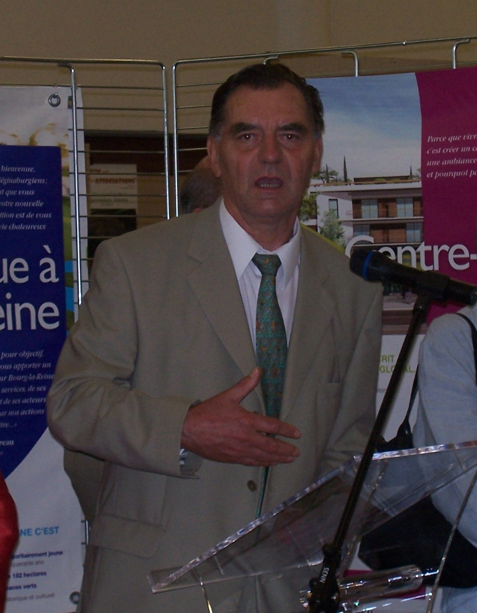 Jean-Noël Chevreau, maire de Bourg-la-Reine au forum des associations Photo Mica 2006